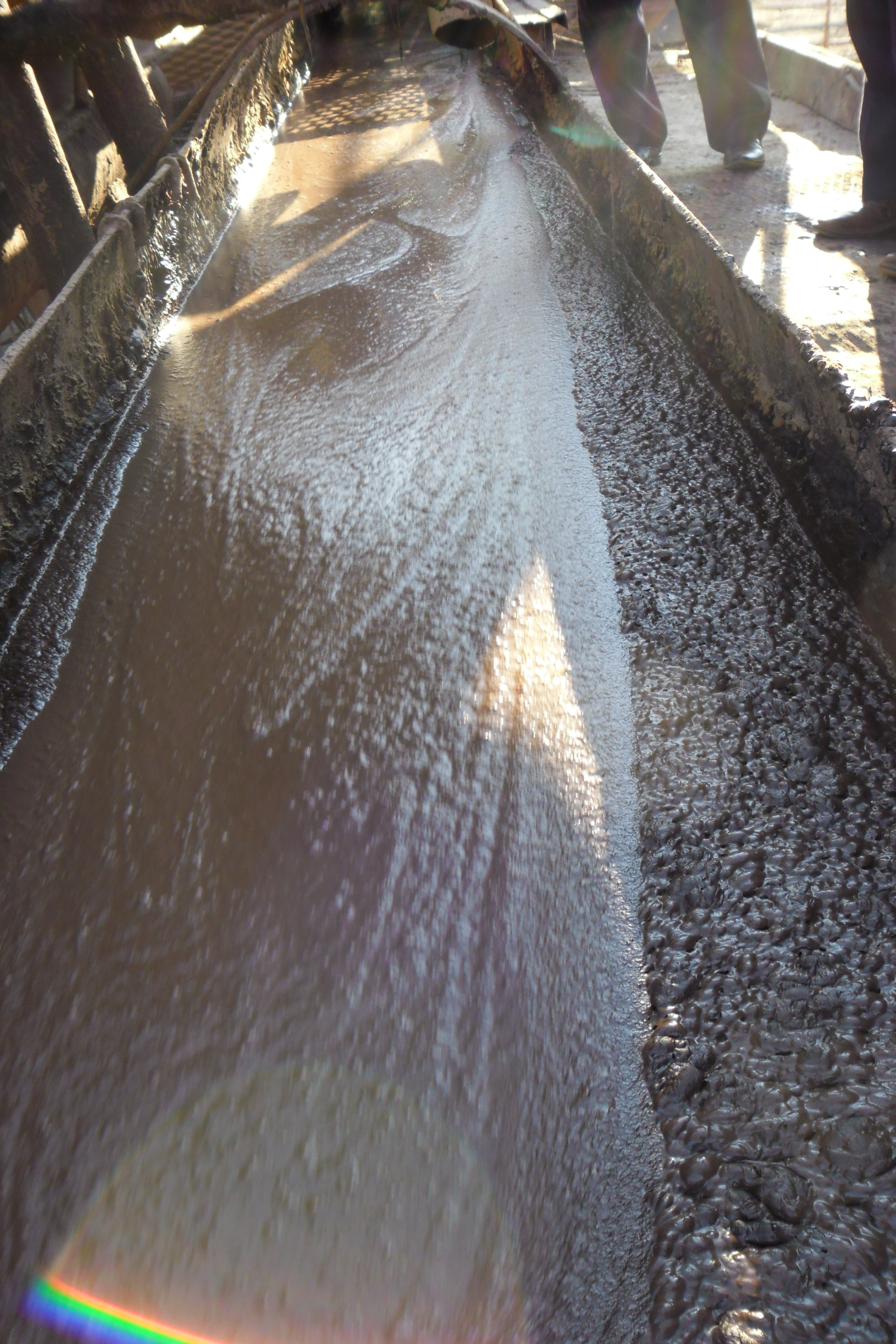 Фото